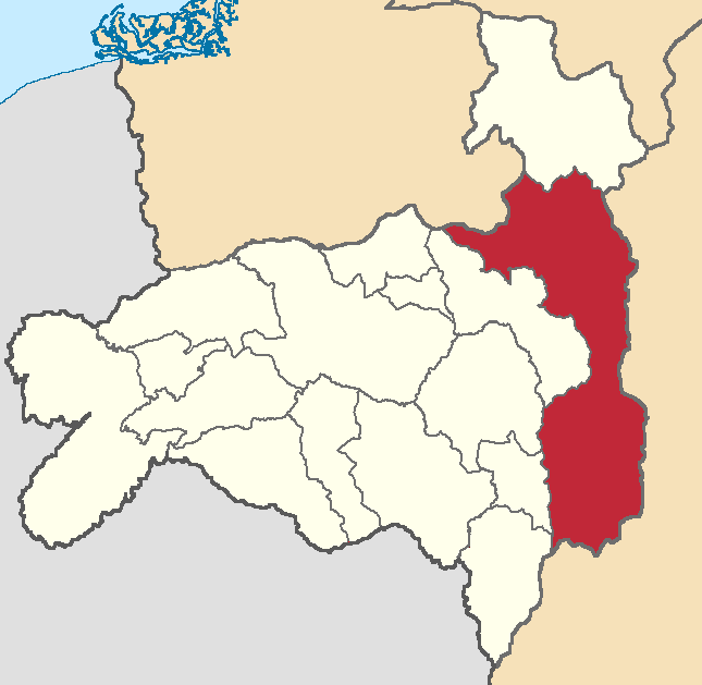 Mapa localizador del cantón en Loja, Ecuador